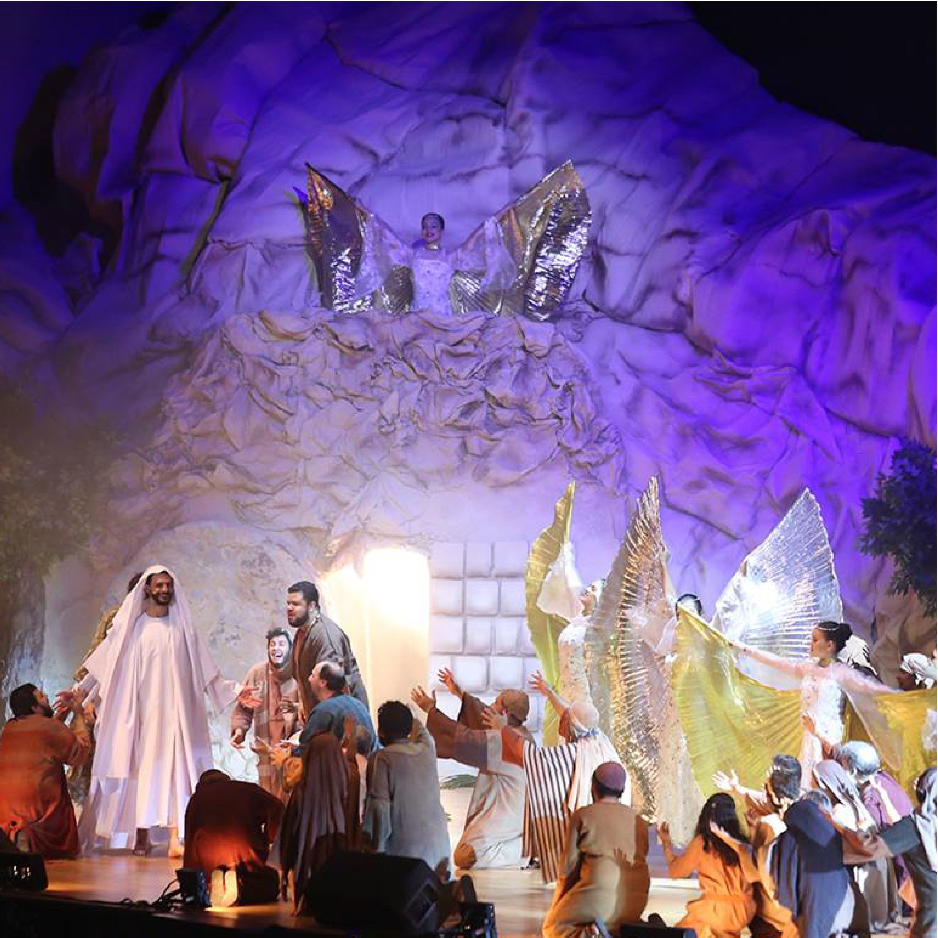 Cena da ressureição